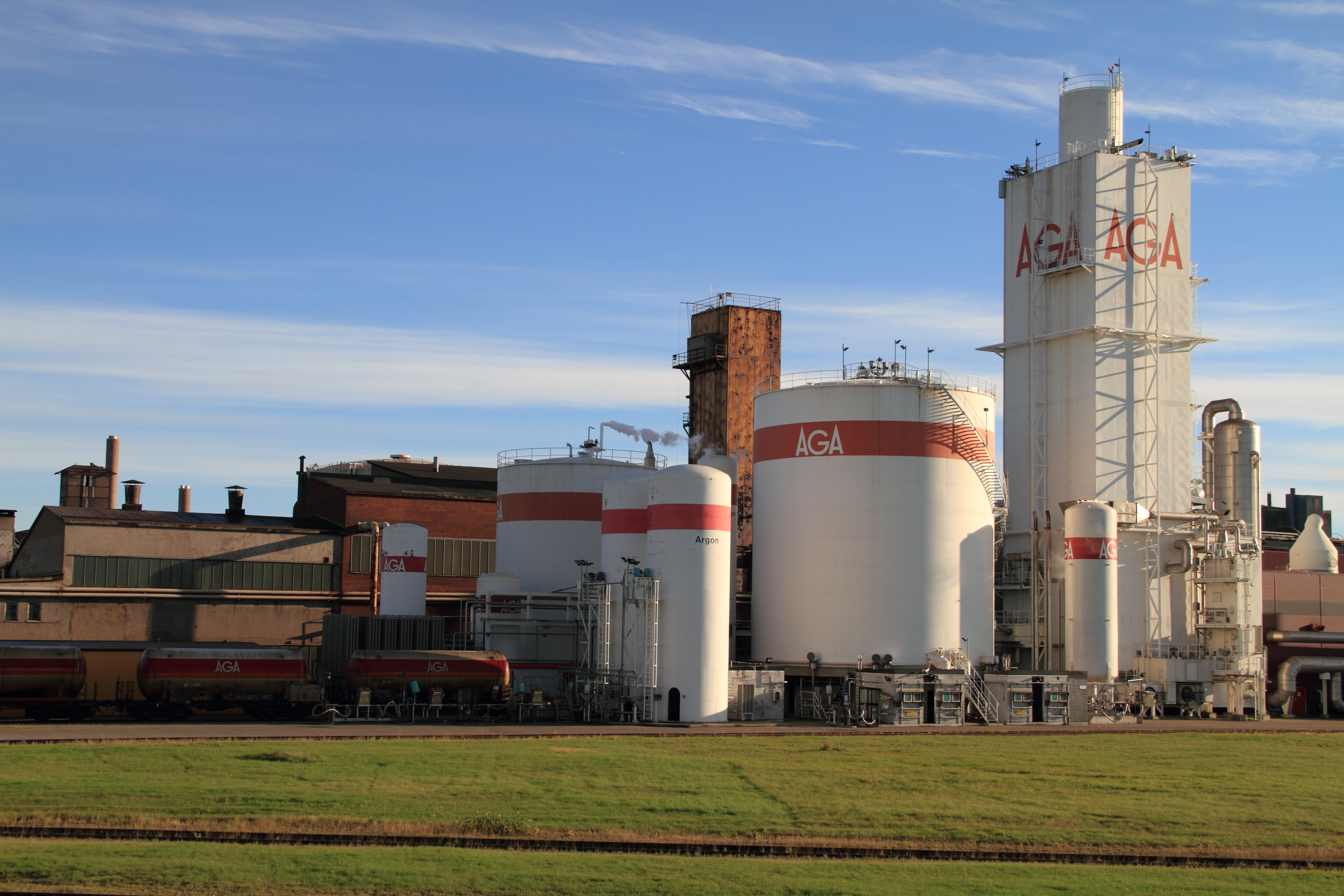 AGA Gas AB in Luleå, Sweden